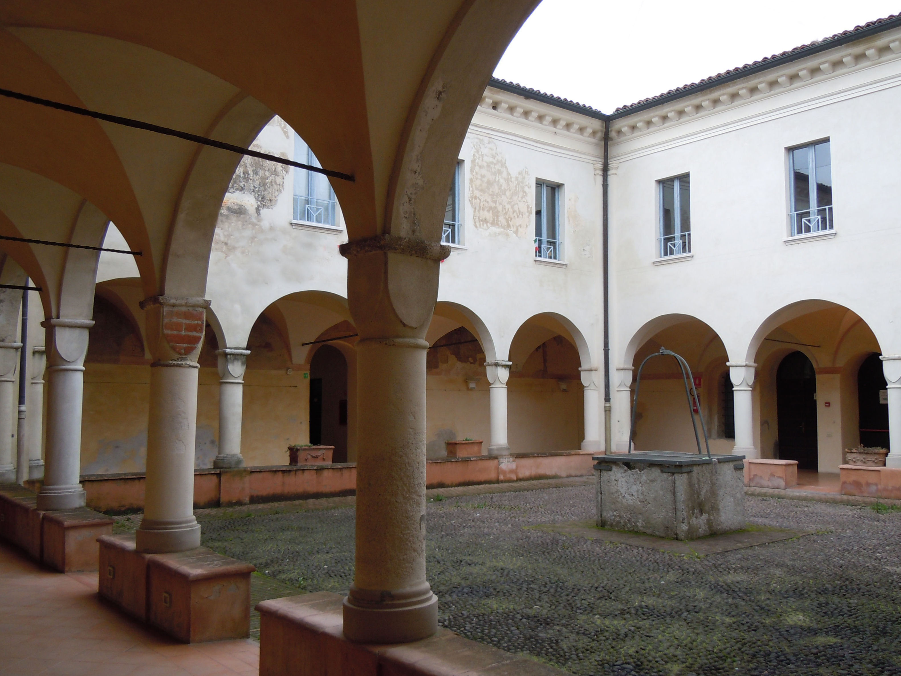 Gonzaga, covento di Santa Maria.